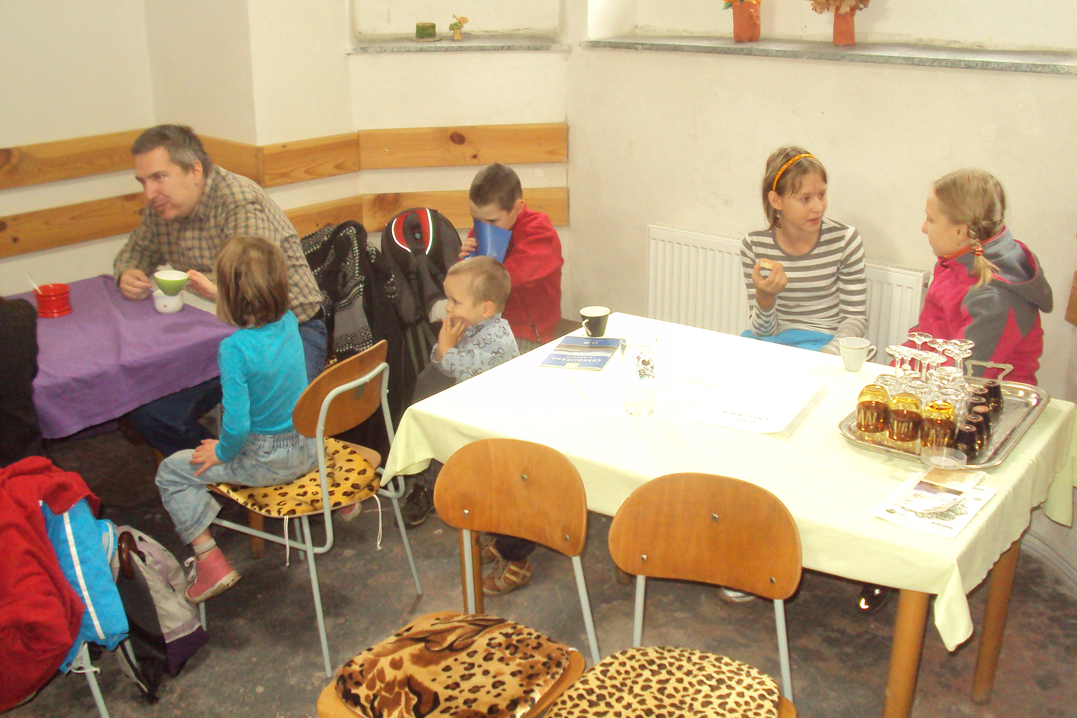 Turisté v cíli pochodu, suterén vily Adéla, Děčínské v České Lípě